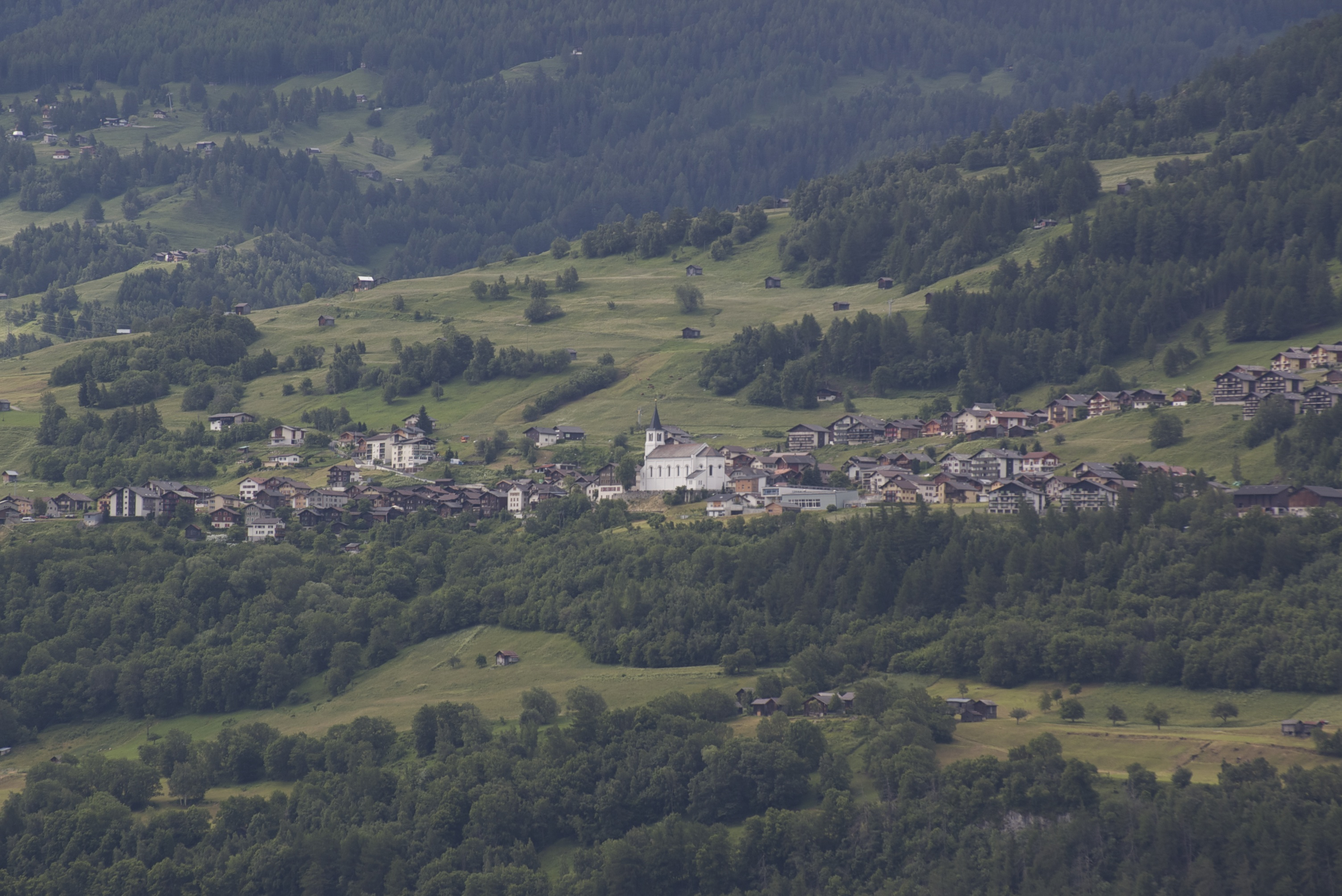 Blick von der Station Hohtenn ob Gieſch auf Eyſcholl am gegenüberligenden Hange des Rottenthals.